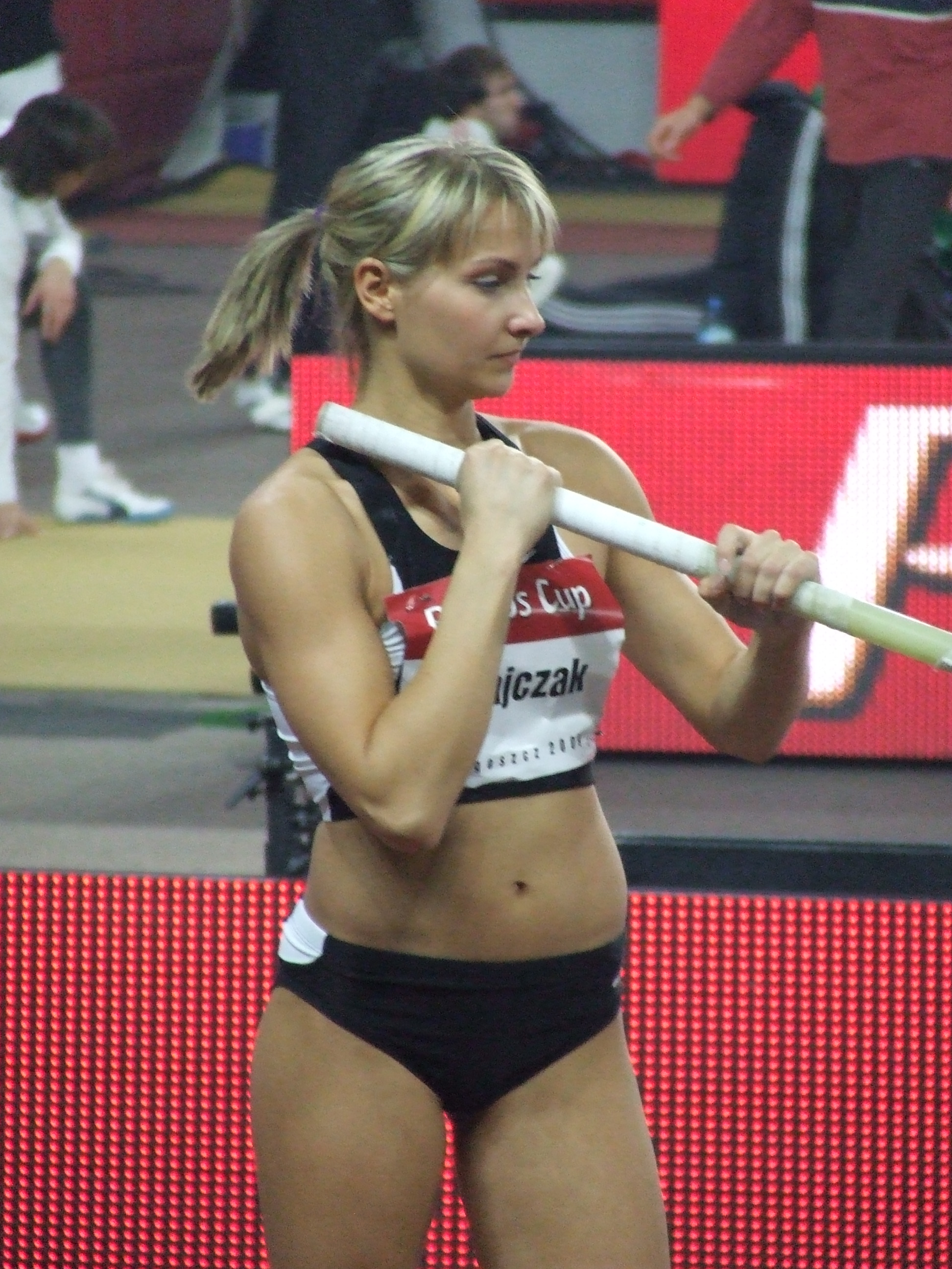 Justyna Ratajczak, polska skoczkini o tyczce, Bydgoszcz Pedro's Cup 2009